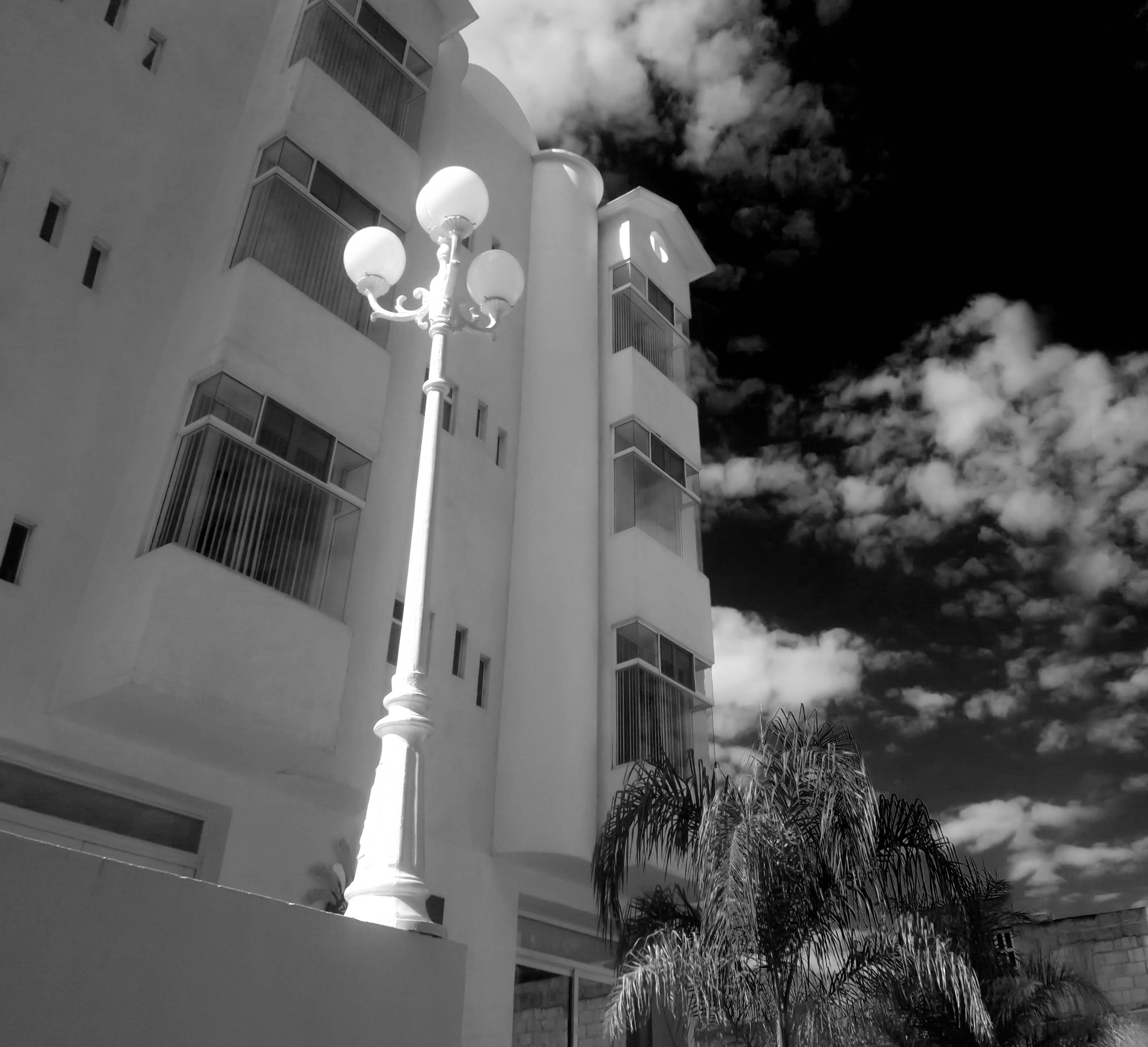 Entre un cielo negro